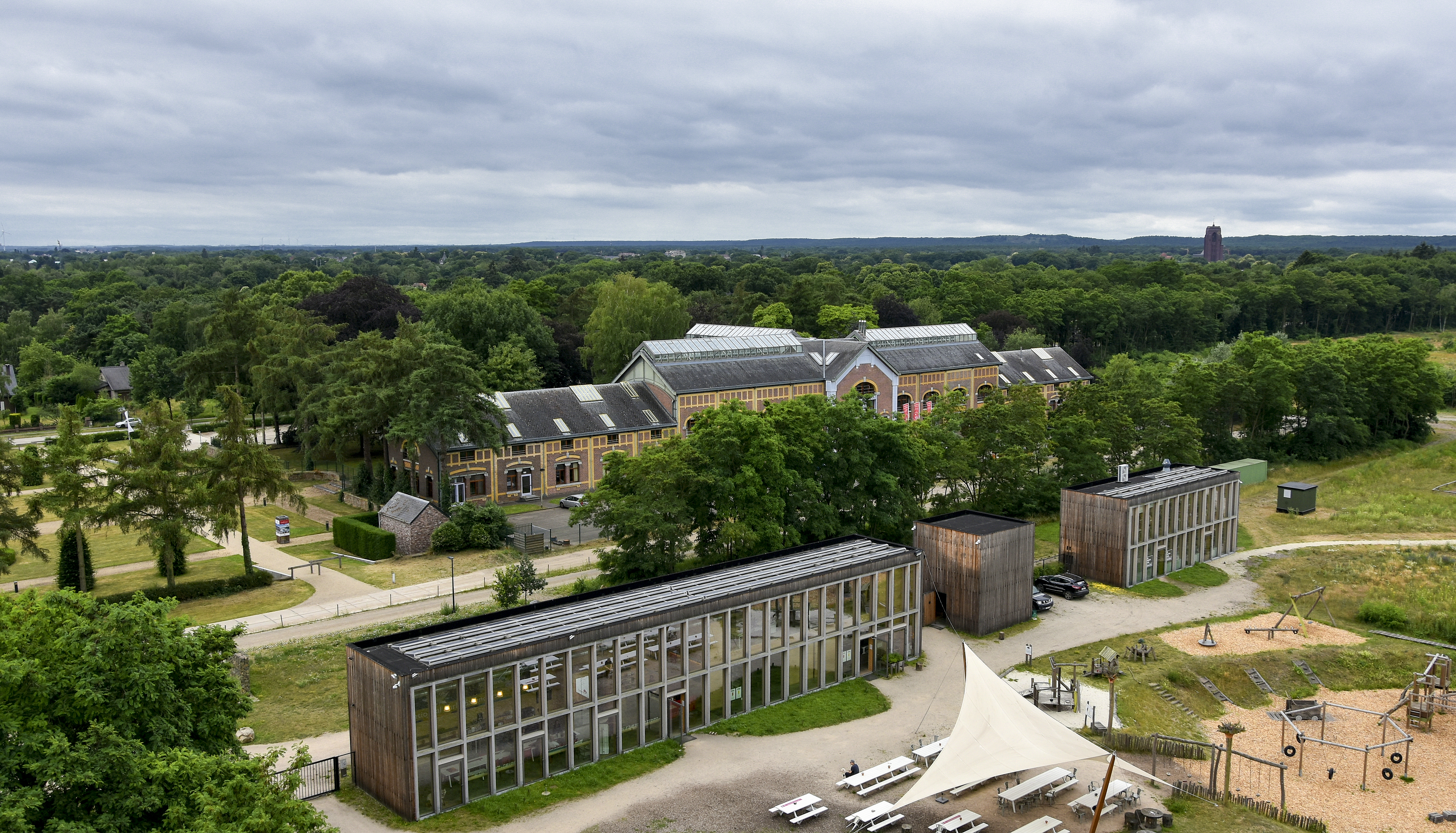 Connecterra - hoofdtoegangspoort van het Nationaal Park Hoge Kempen - Eisden (België) This photo of immovable heritage has been taken in the Flemish Region